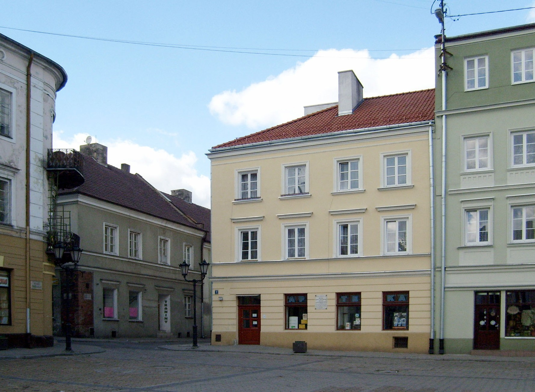 Piotrków Trybunalski Kamienica na rynku z apteką, niegdyś własnością Michała Rawity-Witanowskiego